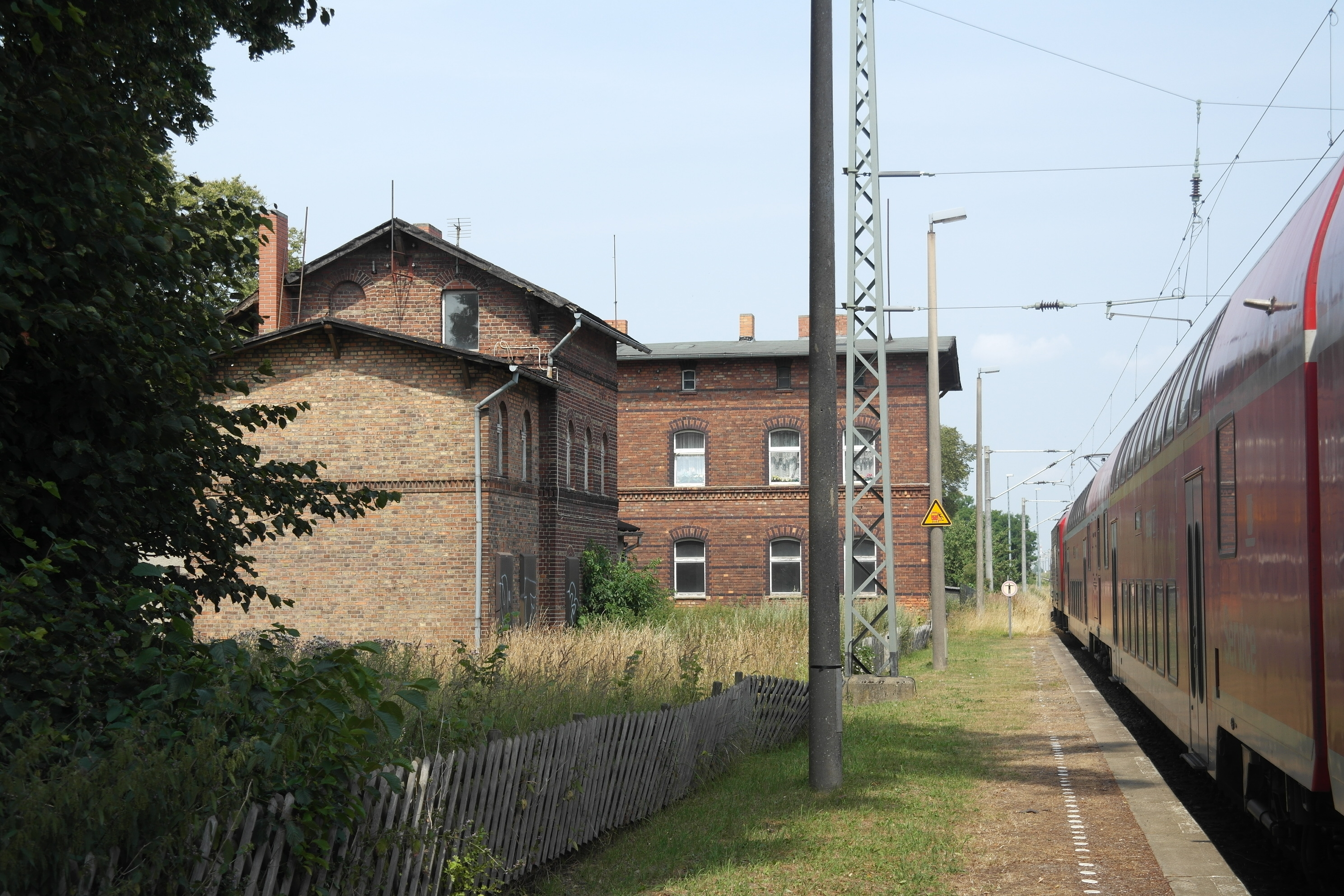 Bahnhof Sternfeld, Bahnsteigseite